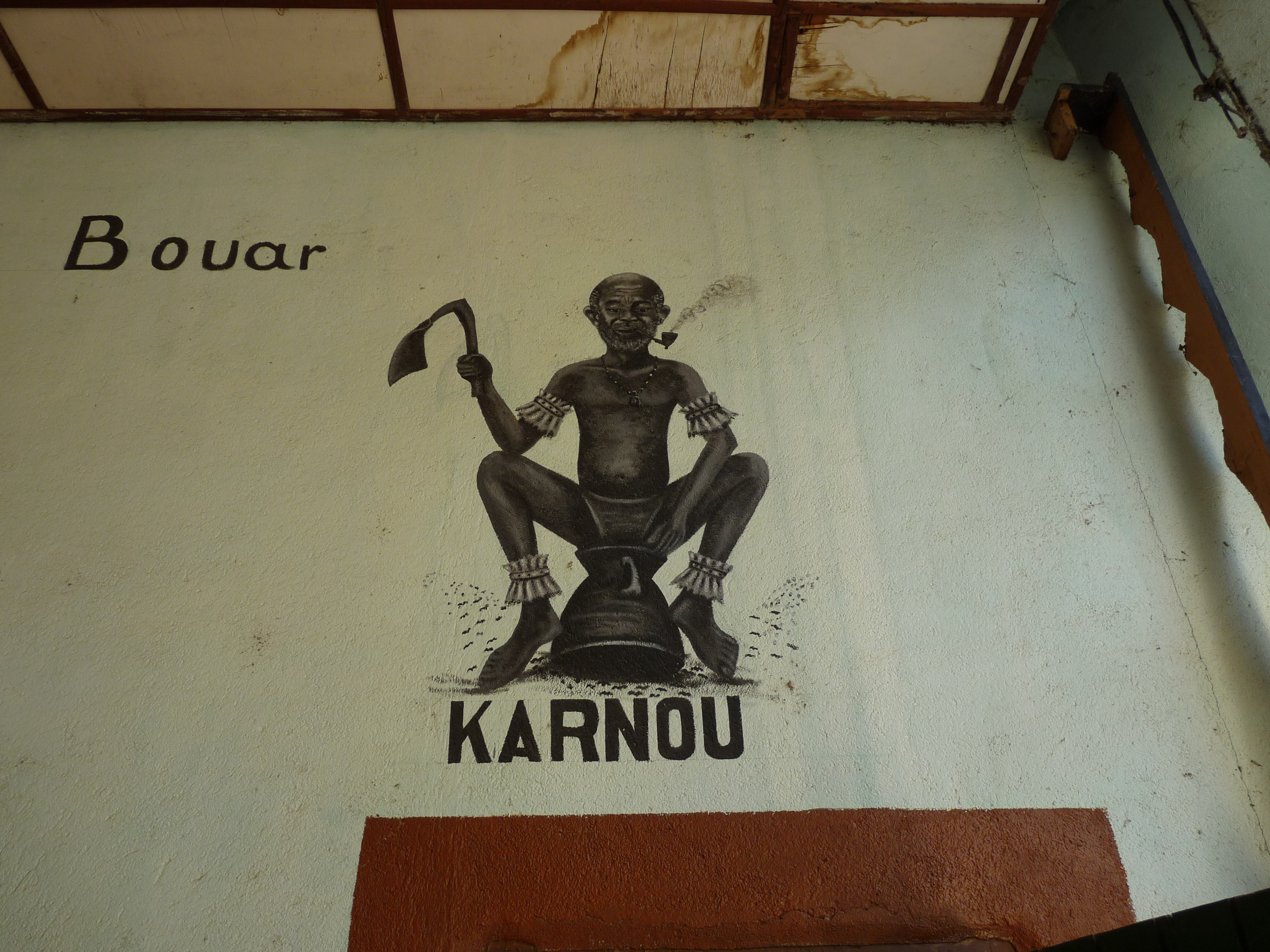 Portrait de Karnou, héros de Centrafrique.